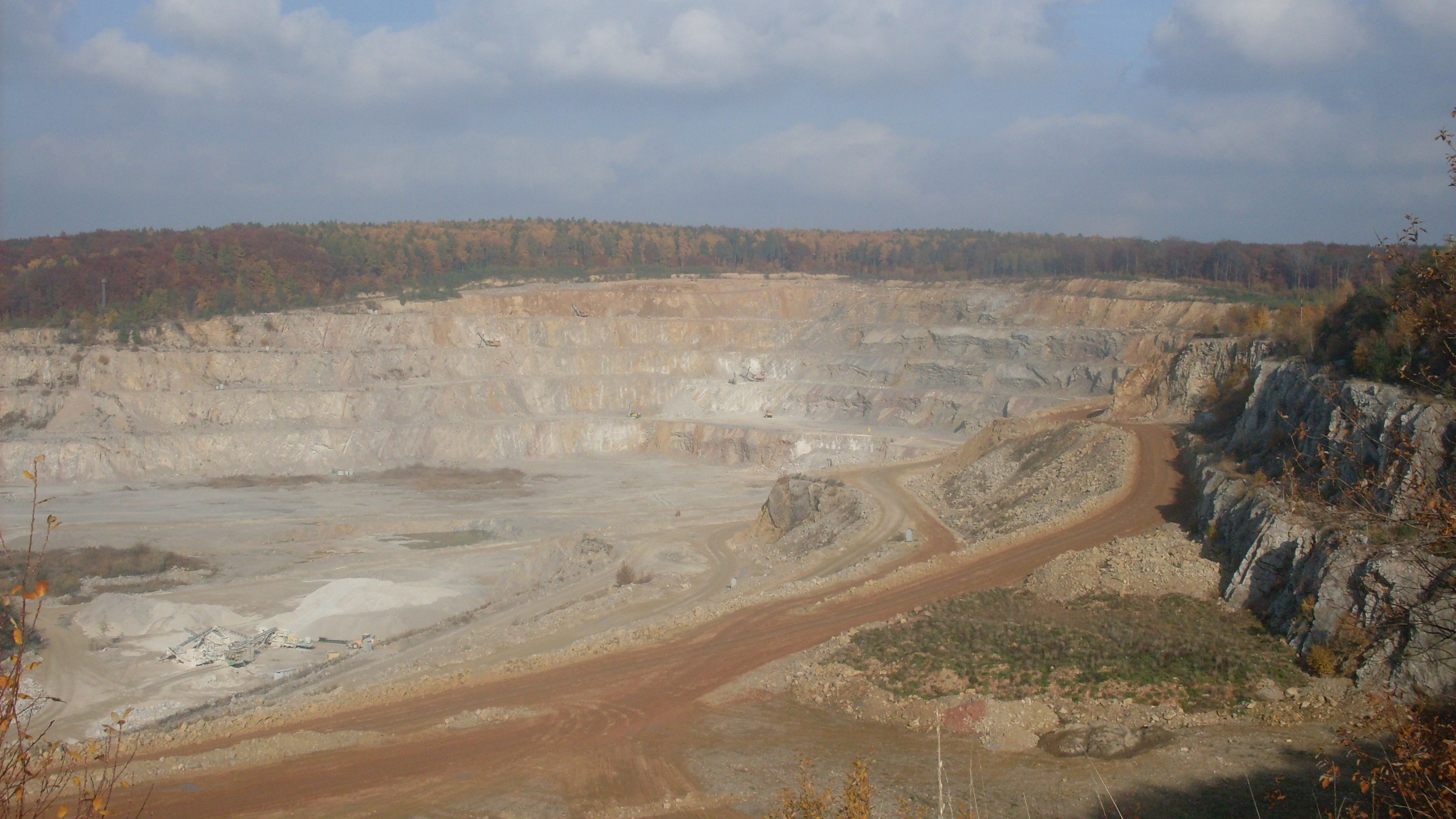 Kamieniołom Czatkowice